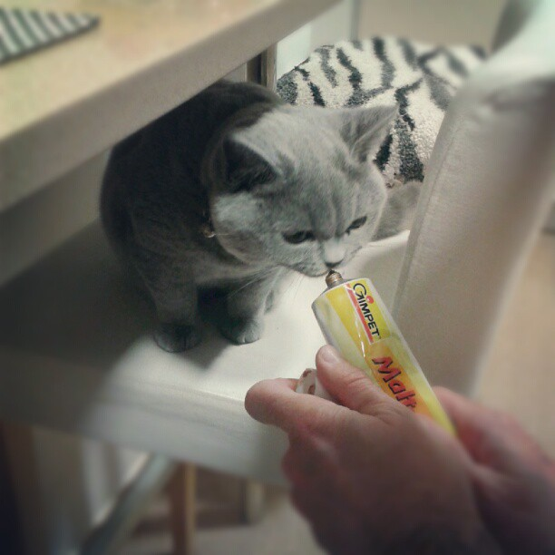 La última foto de Brospin, comiendo malta.